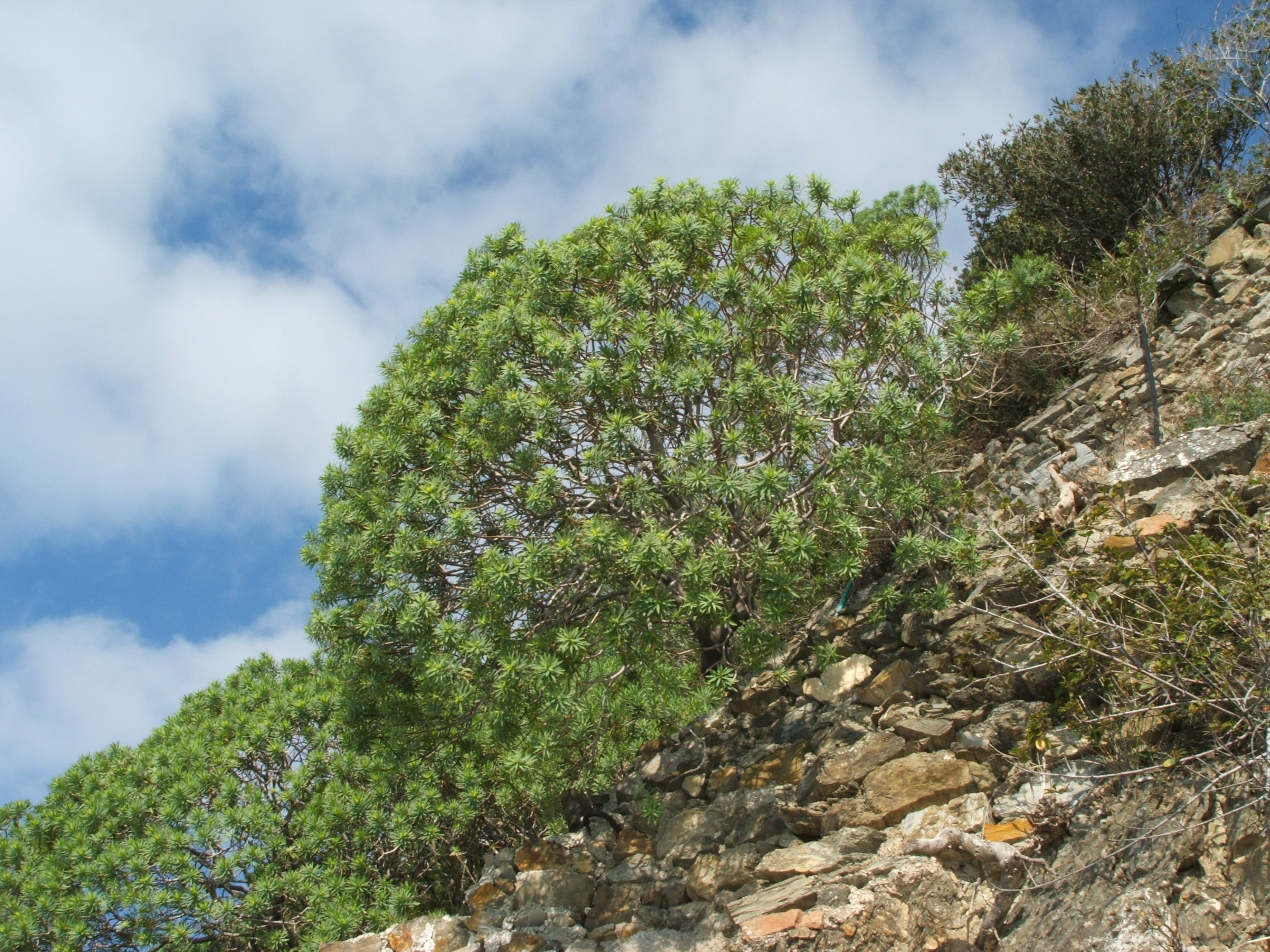 Immagine dalle Cinque Terre: Via dell'Amore Manarola - vegetazione